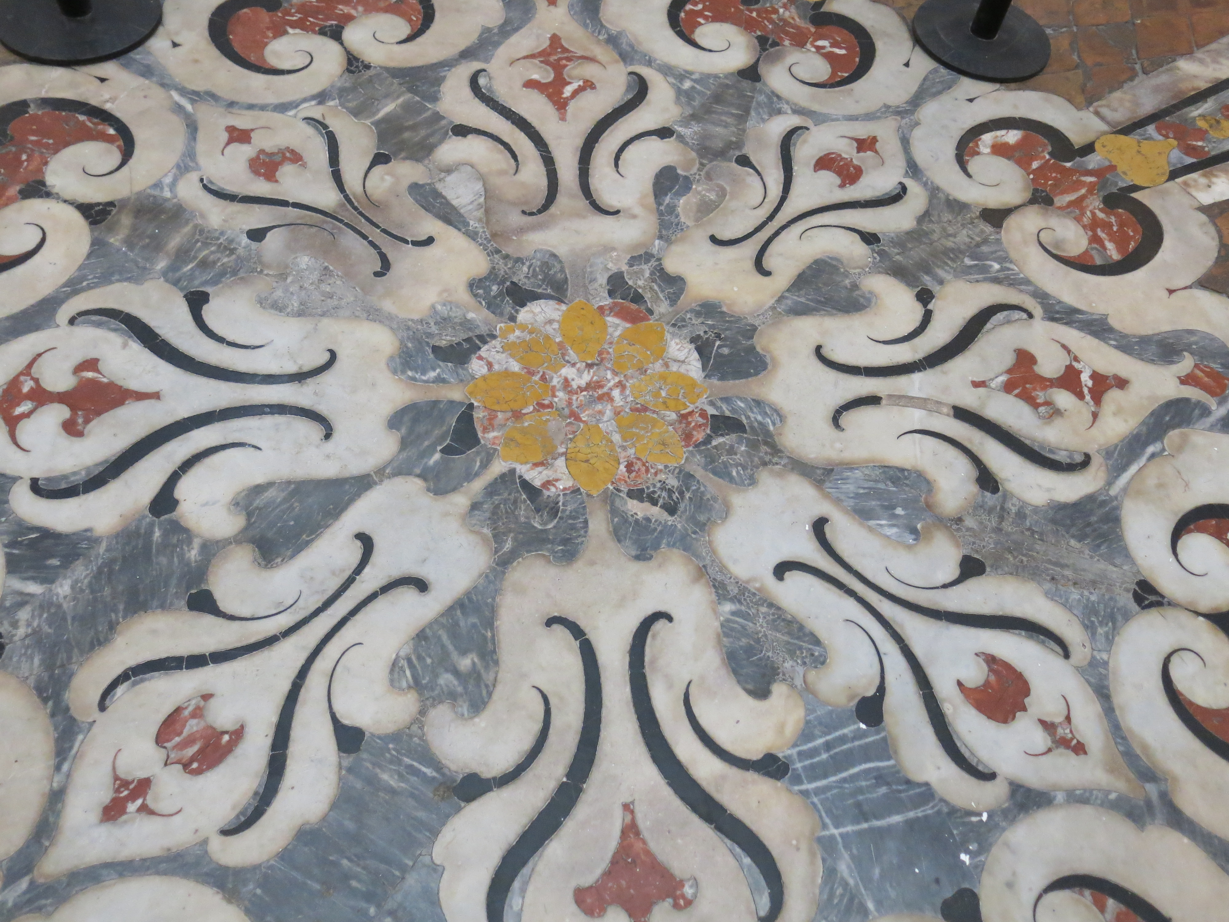 Le chiese di Napoli